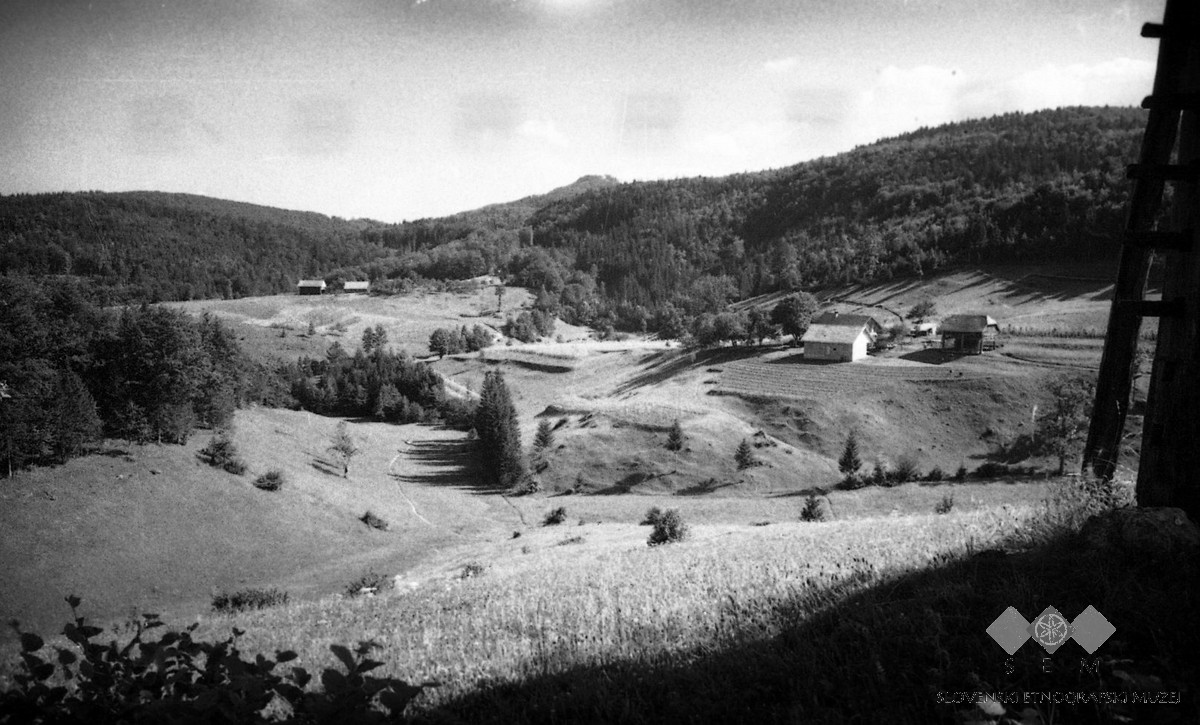 Medvedica, Glažar in Krampl.